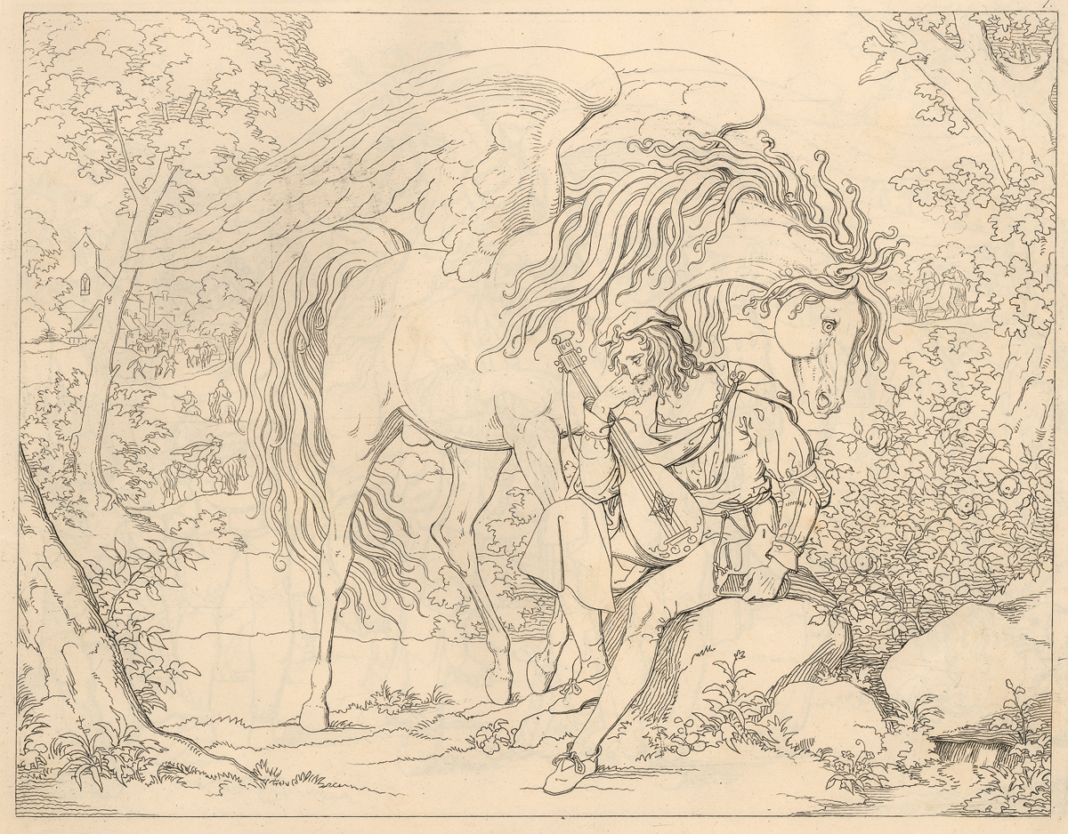 Schiller's Pegasus im Joche nebst Andeutungen zu den Umrissen von Moriz Retzsch.